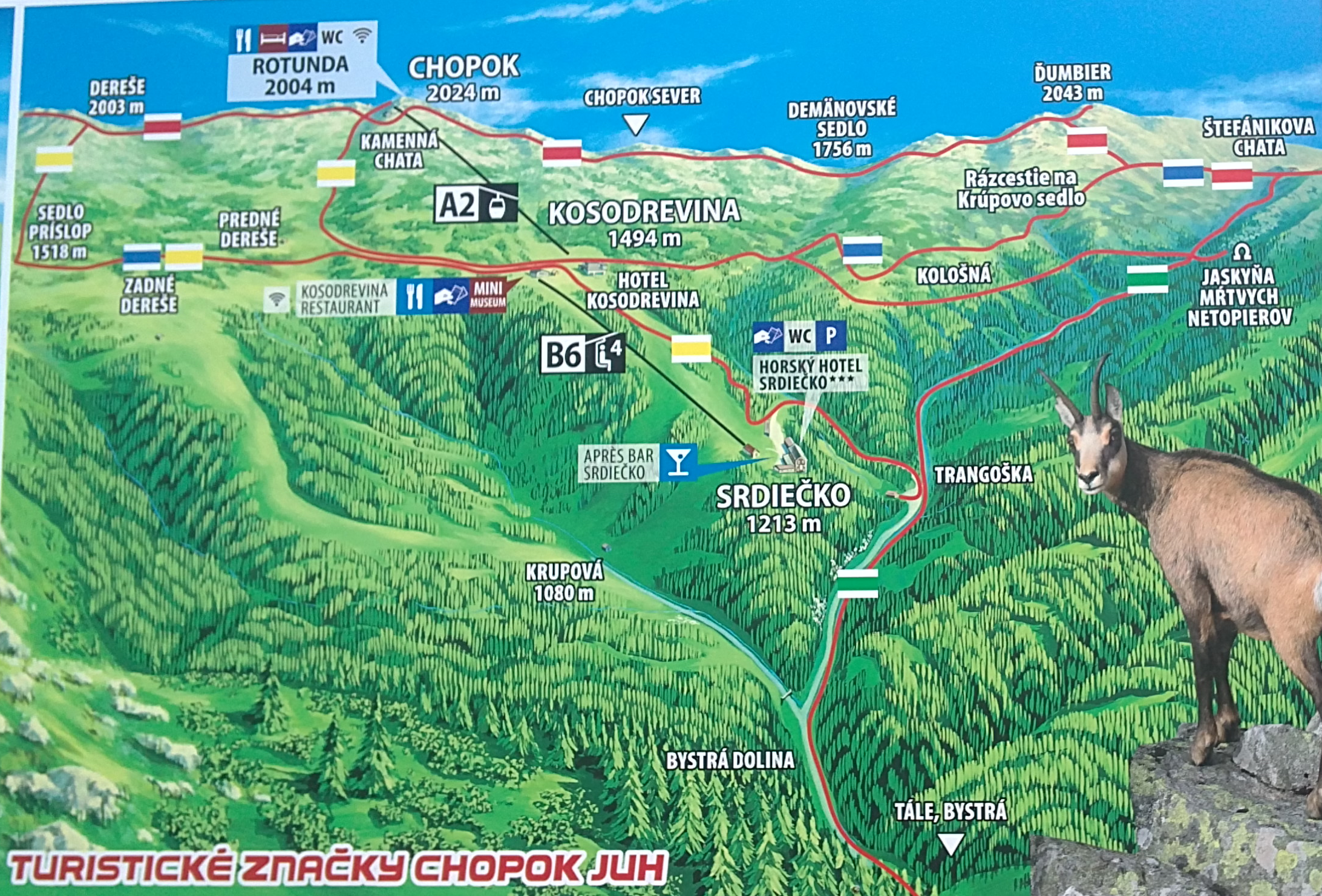 Turistické značky na kreslenej mape Chopok - juh